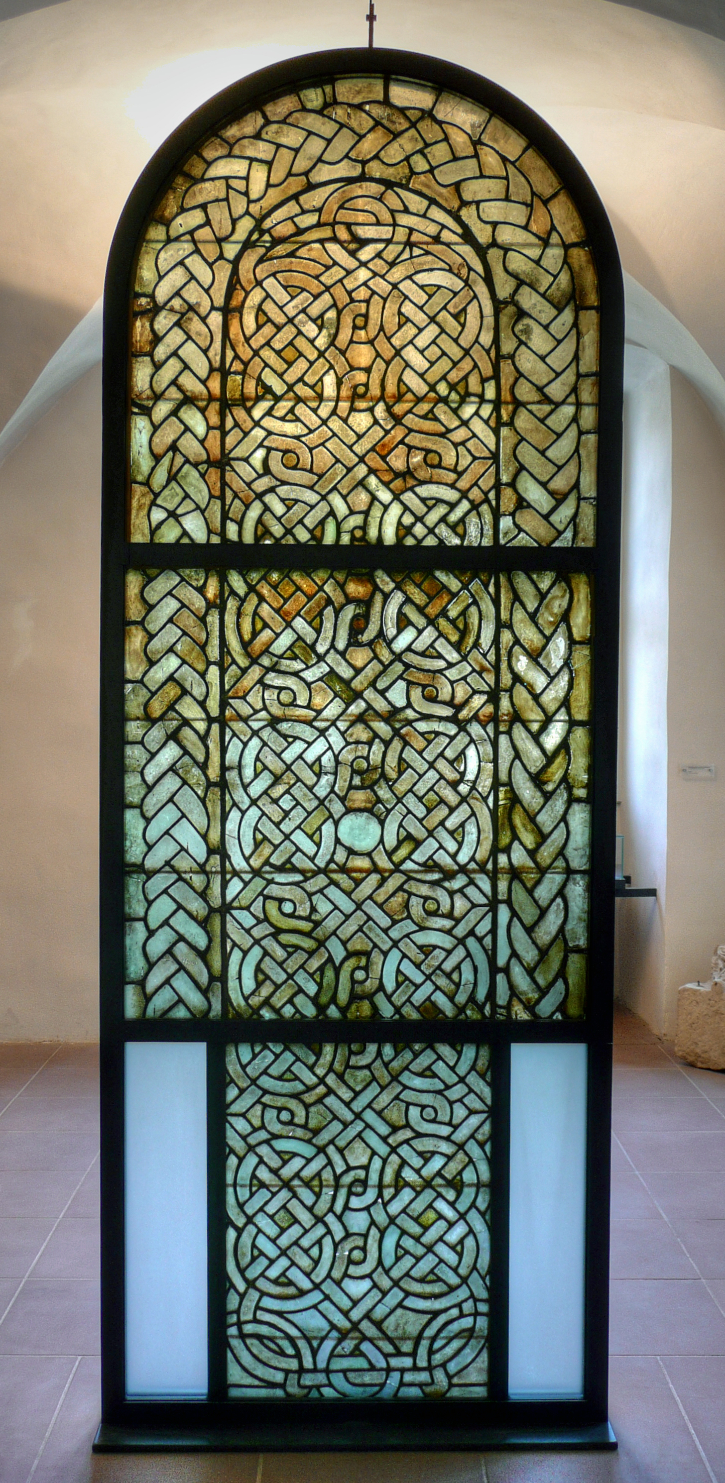 Flechtbandfenster um 1180 (jetzt im Abteimuseum)